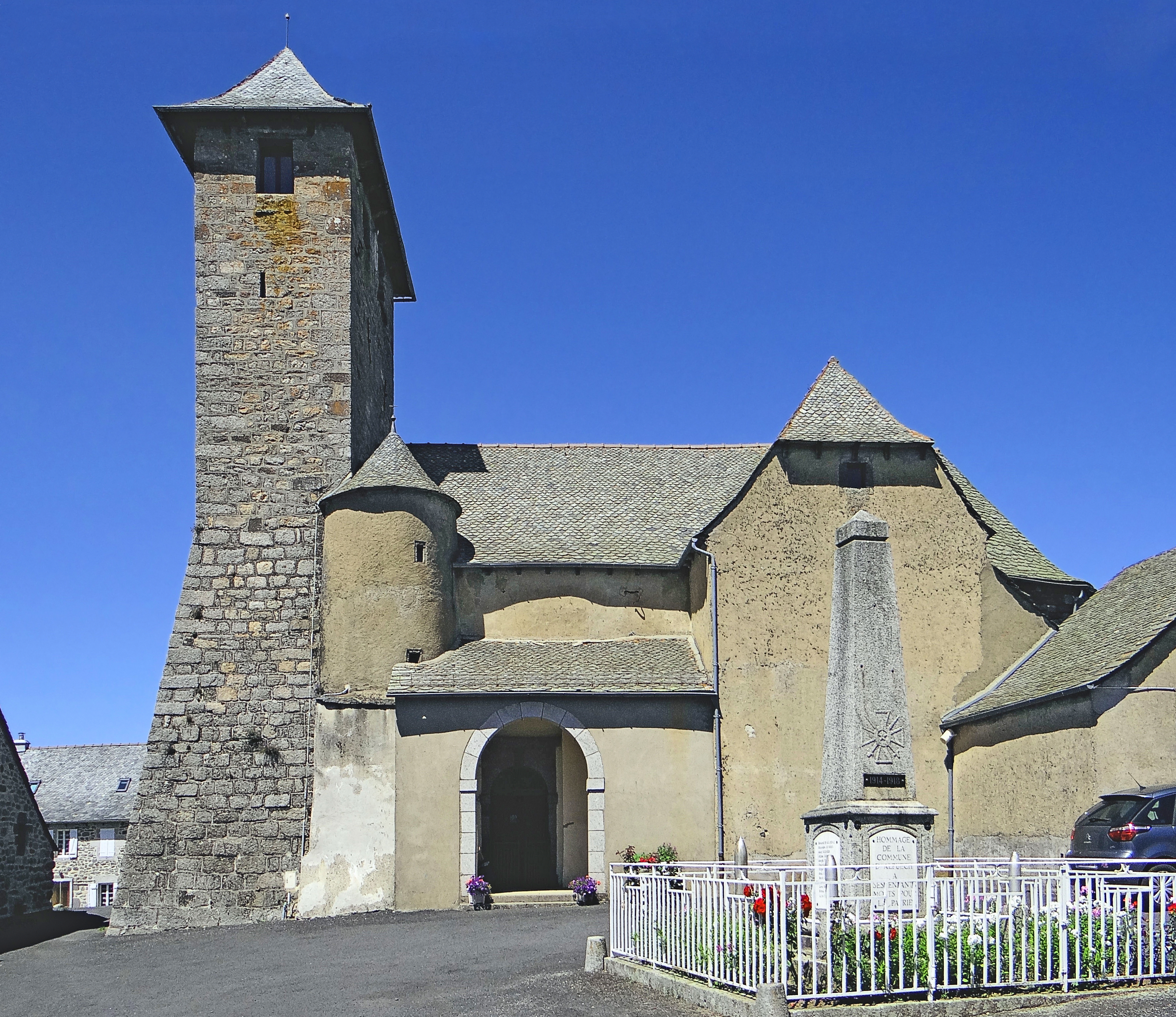 Alpuech - Église Saint-Martin et monument aux morts. Construction : 11e siècle; 12e siècle.